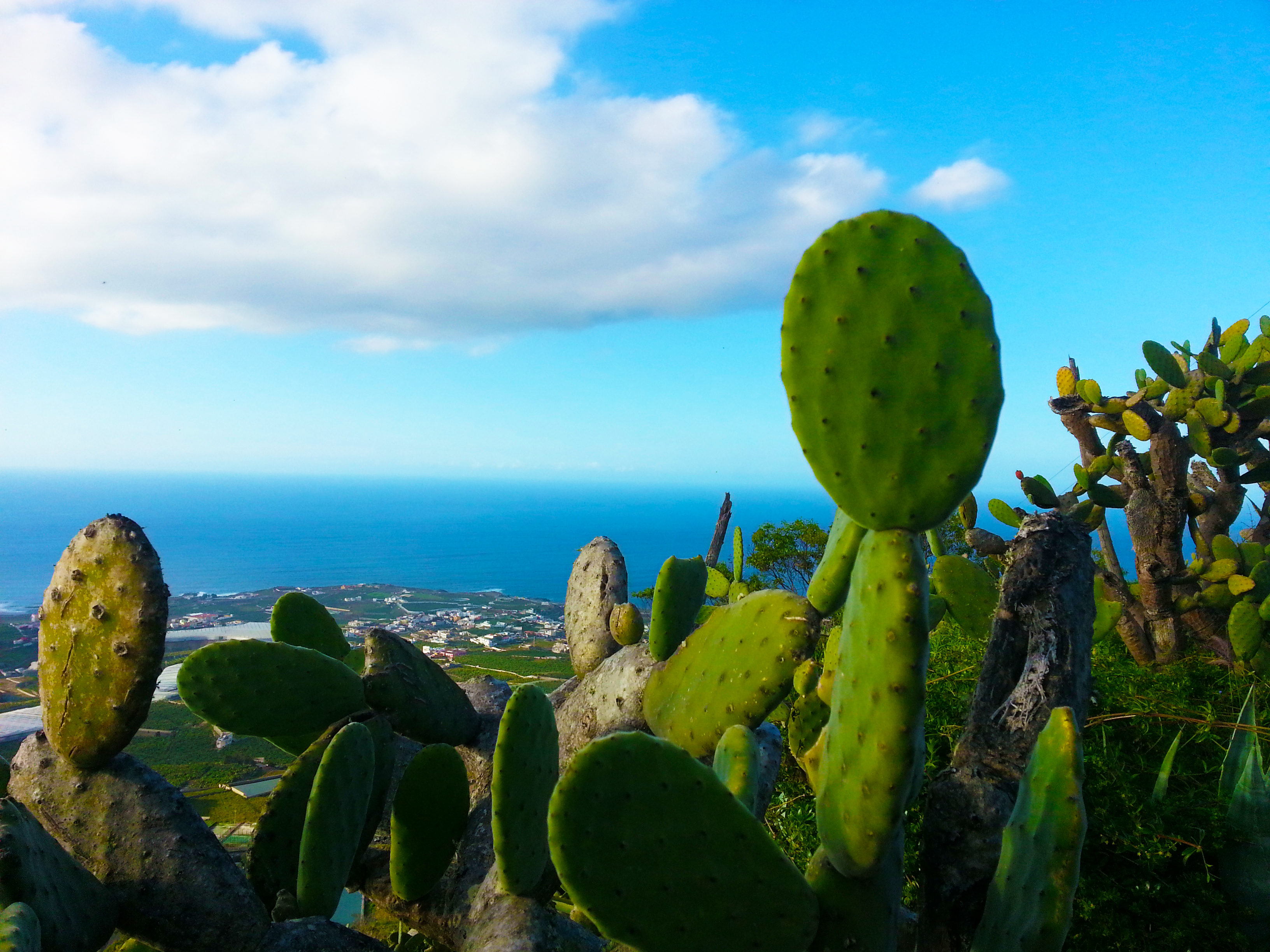 Opuntia ficus-indica, Tunera Canaria.